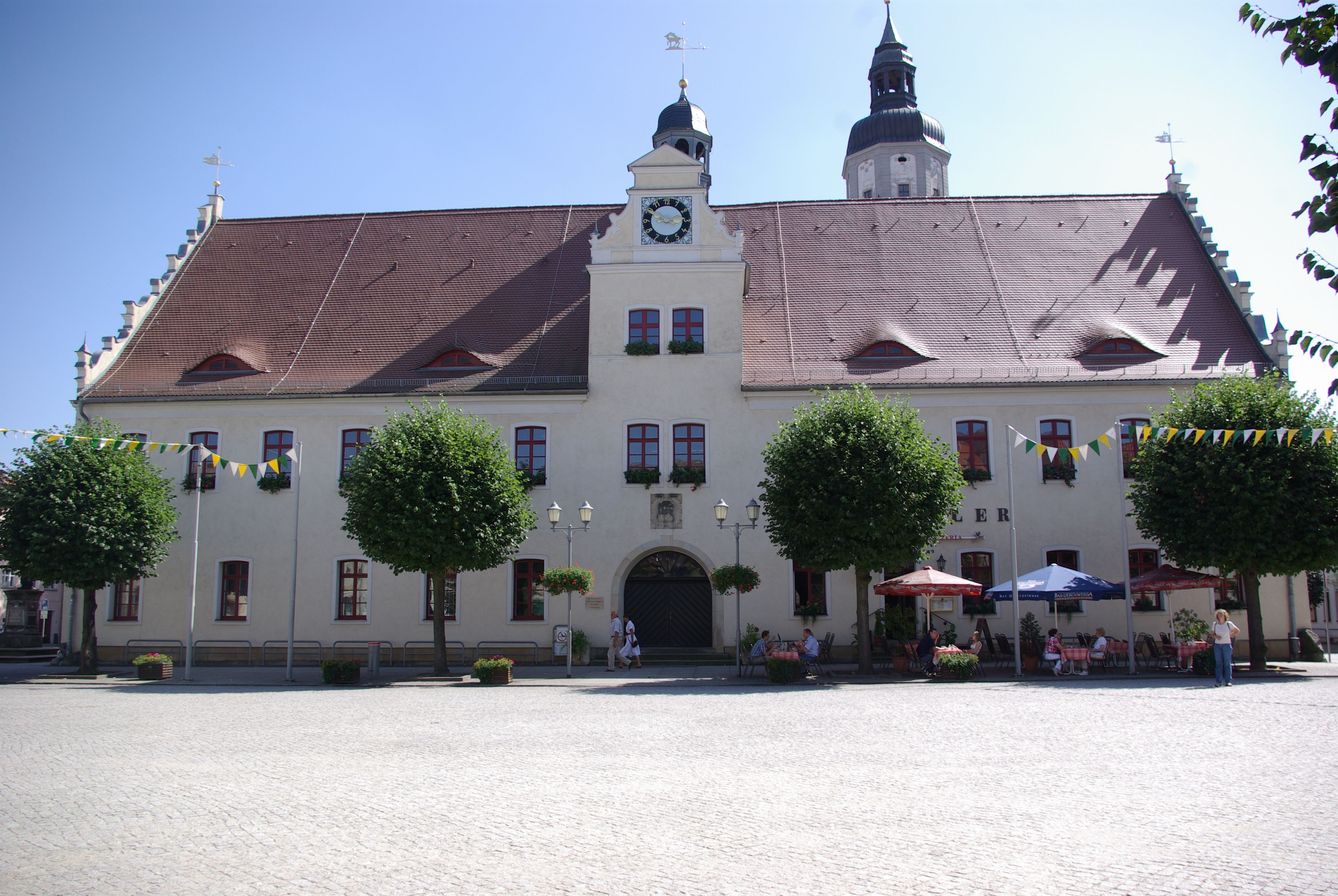 Herzberg / Elster in Brandenburg. Das Rathaus am Markt 1 steht unter Denkmalschutz. Hinter dem Rathaus befindet sich die Stadtkirche St. Martin, deren Kirchturm man noch sieht.